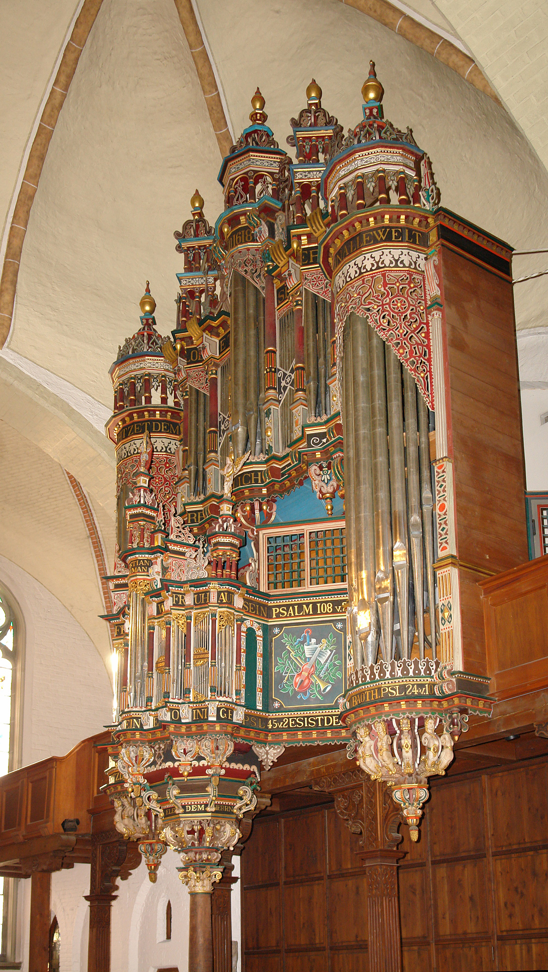 St.Martini-Kirche in Bremen. Orgelprospekt von 1619. Blick vom Eingang (Nordseite)